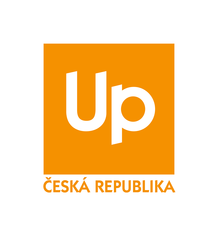 Logo společnosti Up Česká republika s.r.o.